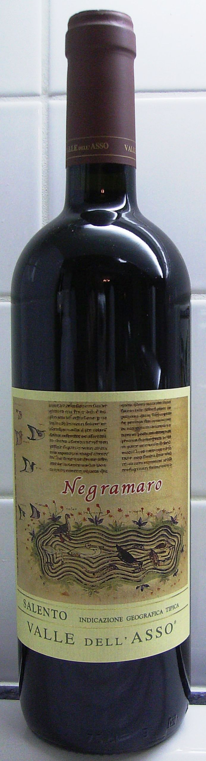 Negramaro - Vin du Salento - Italie